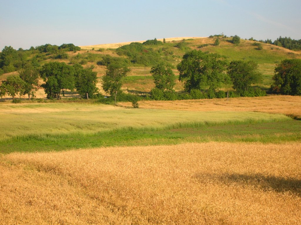 Zbocze Fordońskie